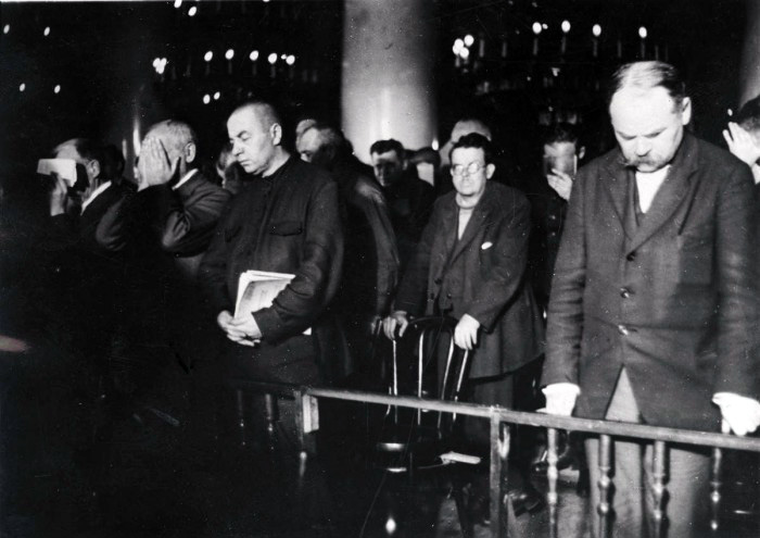 Обвиняемые в Шахтинском деле на процессе в Москве. Справа "русские", приговоренные к смертной казни. Человек с документами и человек в очках - "немцы", которых продержали около года в тюрьме.